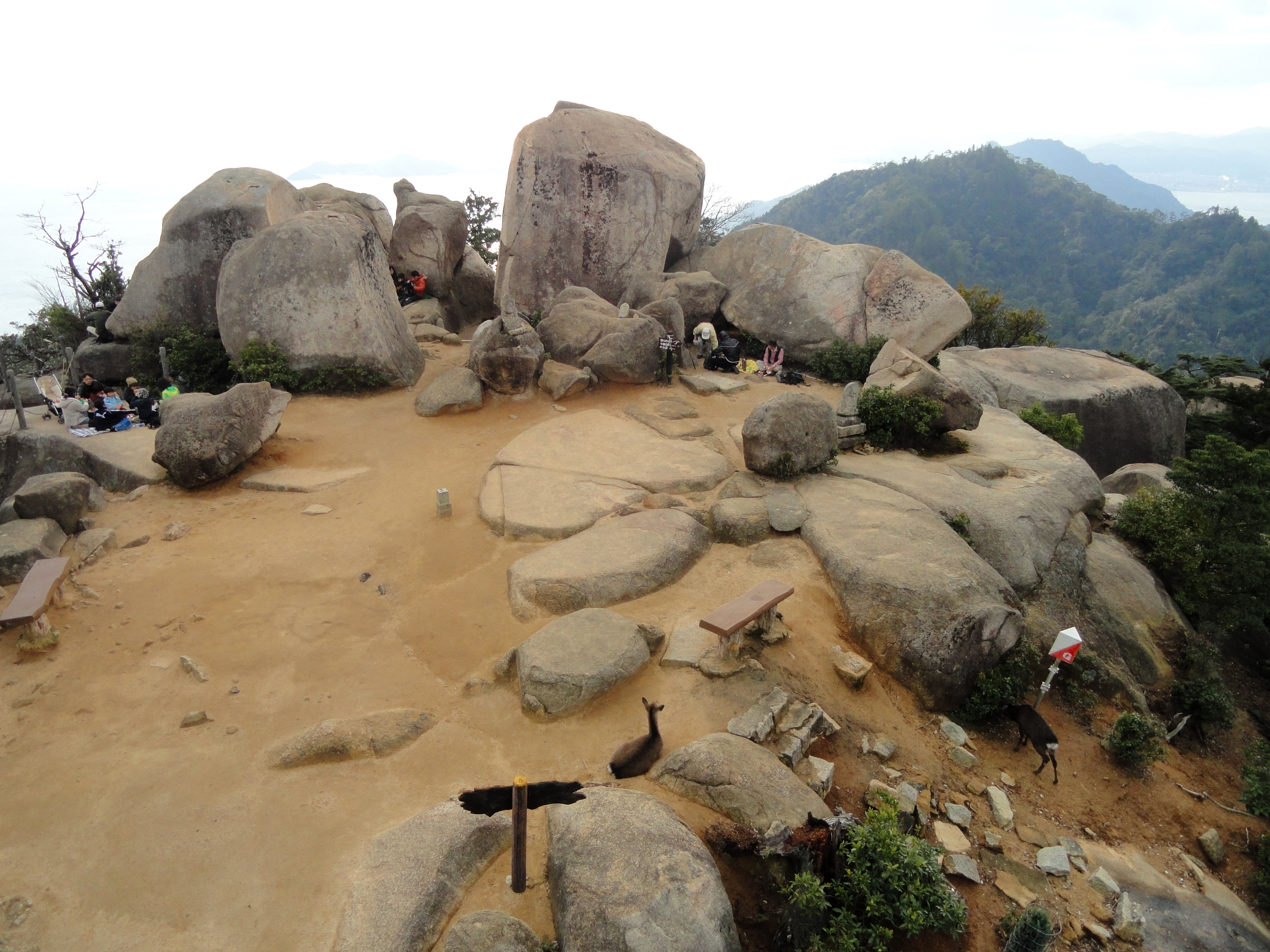 Mount Misen, Miyajima-cho, Hatsukaichi-shi, Hiroshima-ken, Japan.